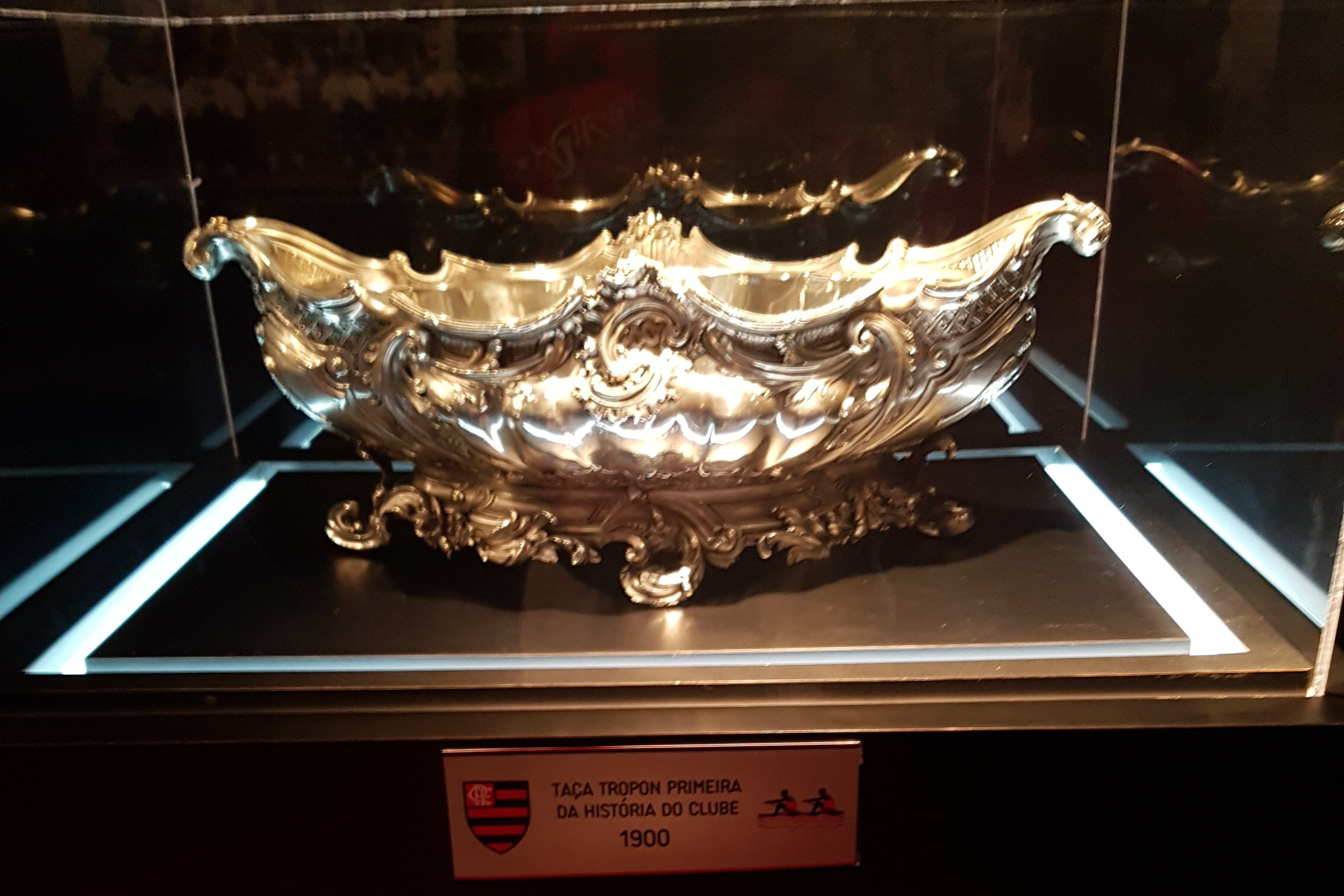 Taça Tropon de 1900, o primeiro troféu da história do C.R. Flamengo, em exposição na Gávea.